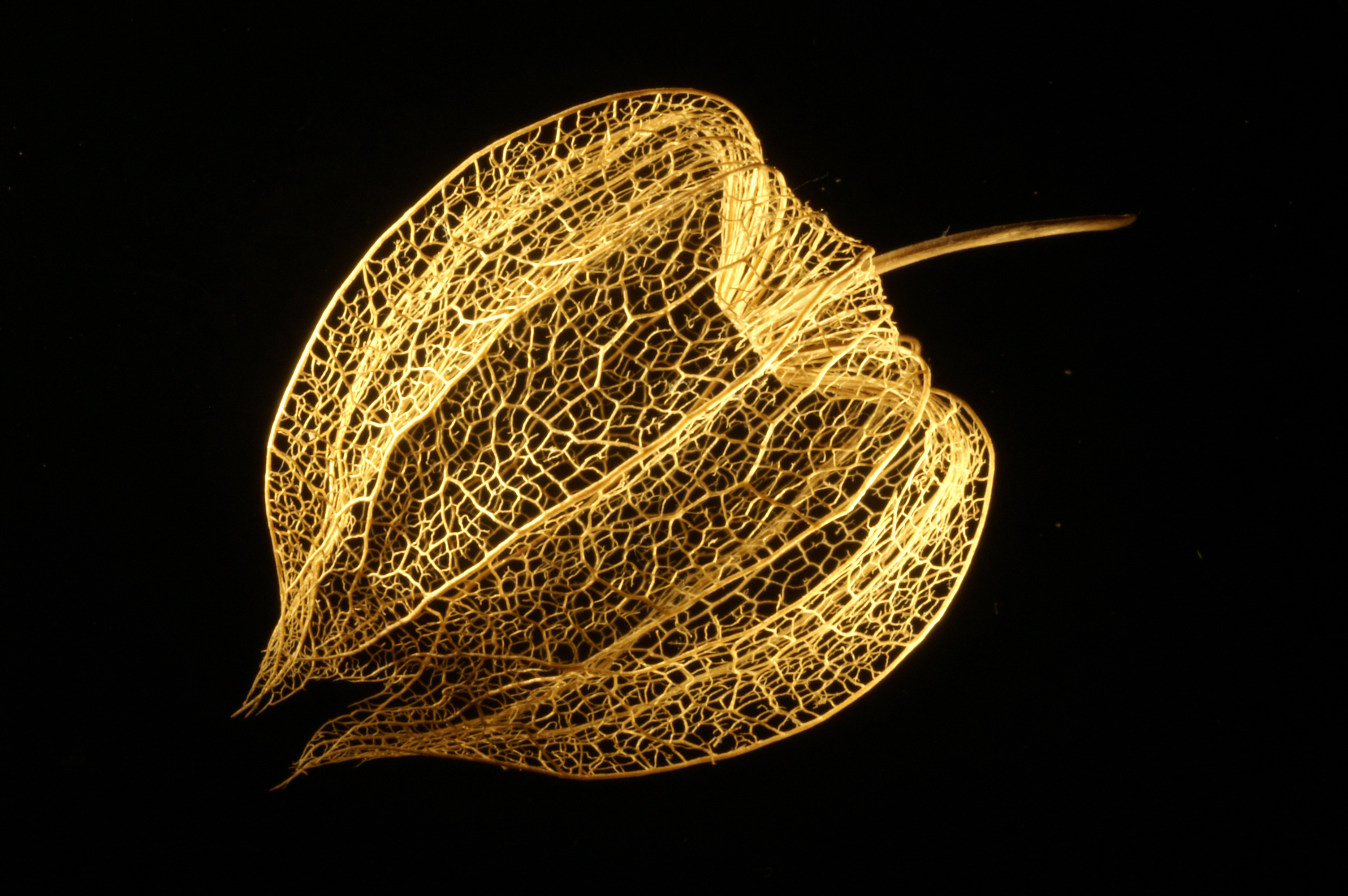 Netzstruktur des Kelches einer Blasenkirsche (Physalis sp.)